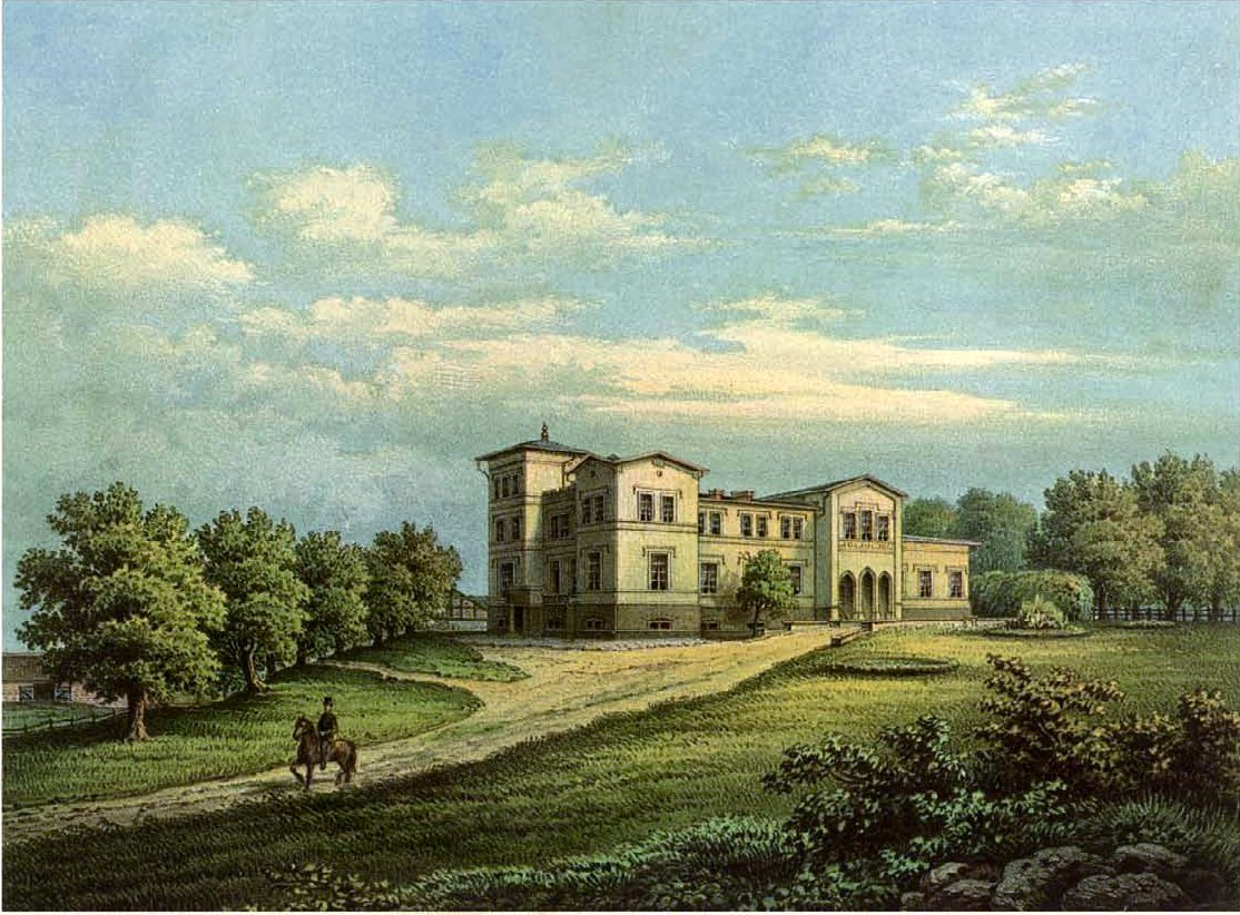 Gut Partheinen, Kreis Heiligenbeil, Provinz Preussen